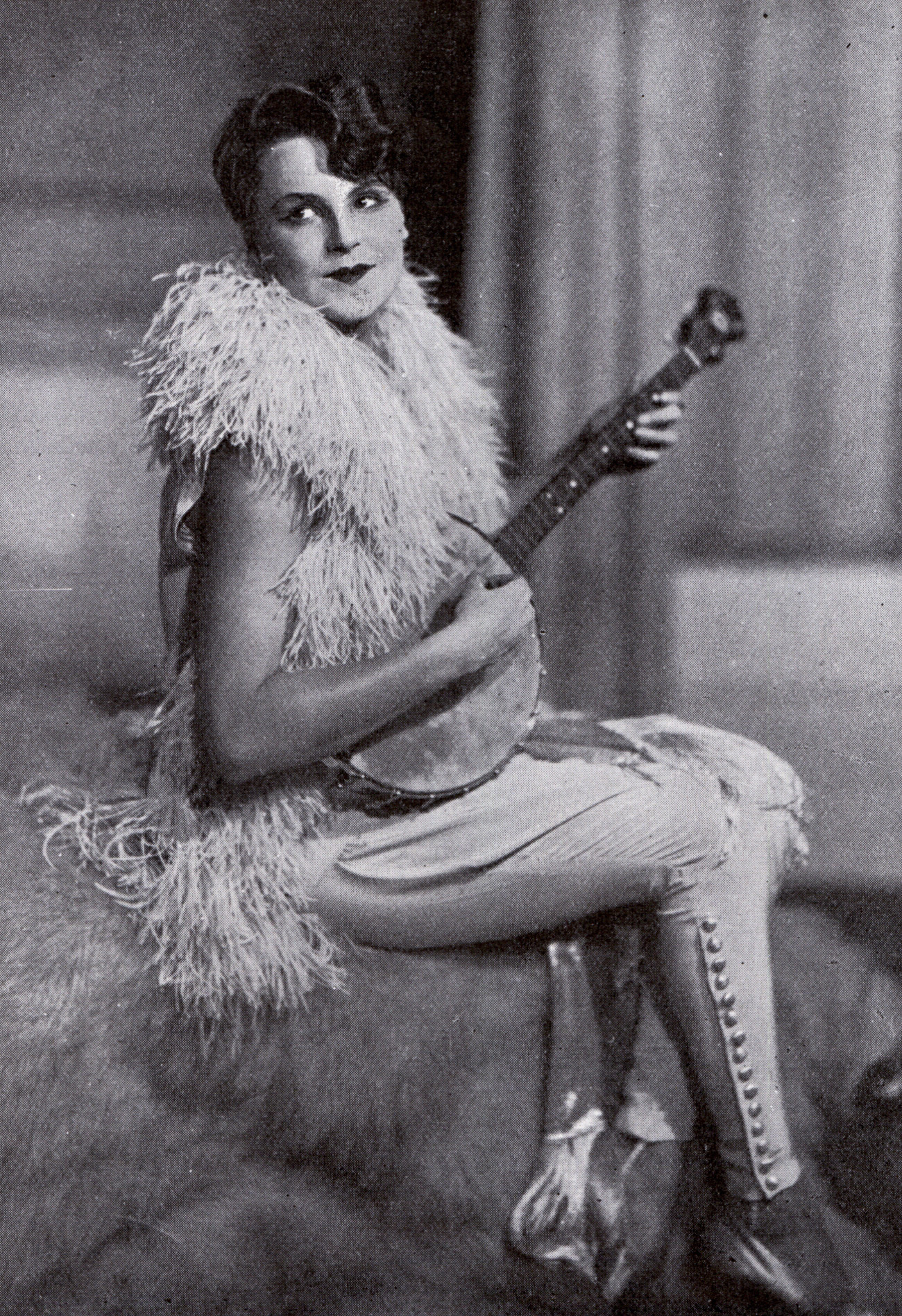 Margit Rosengren (1901-1952) som Mimi i operetten Adjö Mimi. (Foto i Scenen 1927).